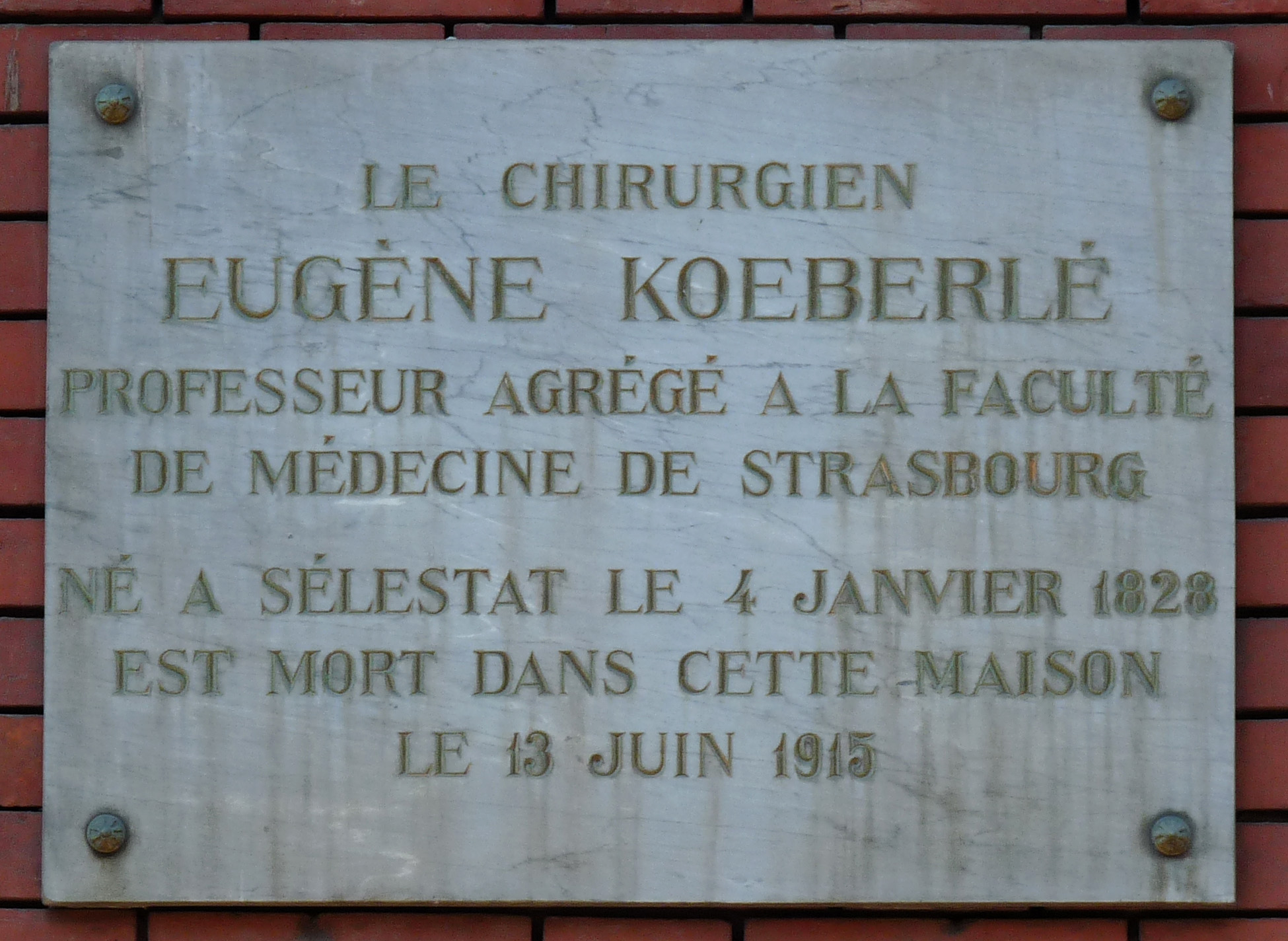 Maison de Strasbourg (14, quai Kléber) où mourut le docteur Eugène Koeberlé le 13 juin 1915 : plaque commémorative